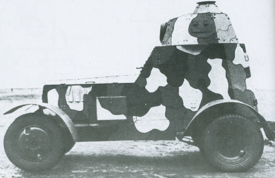 Prototyp samochodu pancernego wz. 34 w malowaniu wz. 31, tzw. kamuflaż japoński (stosowany do 1936 roku). Wyposażony w jarzmo kuliste wz. 35.